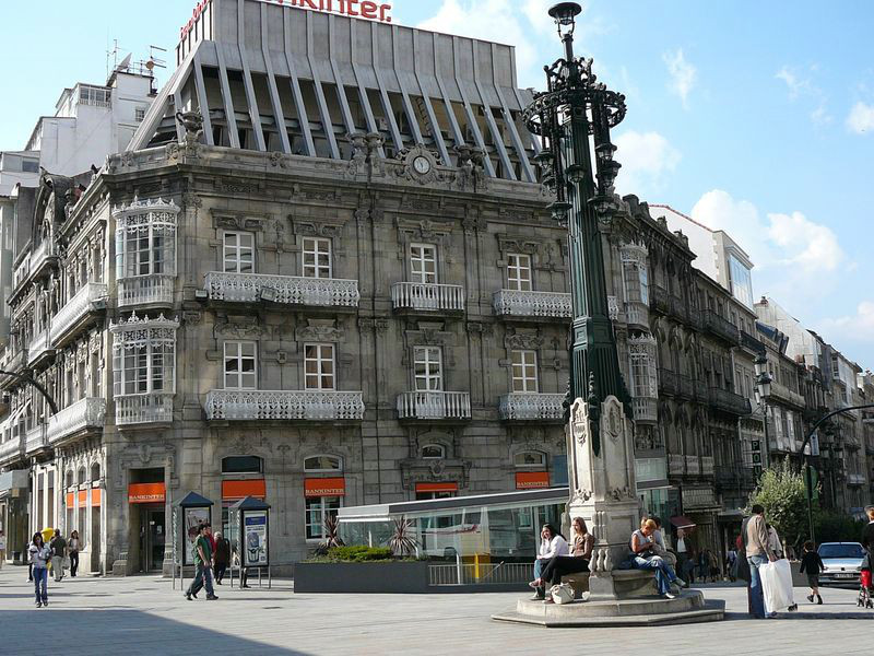 Casa Bernardo Rodríguez López. Edificio proxectado en 1883 por Jenaro de la Fuente Domínguez.